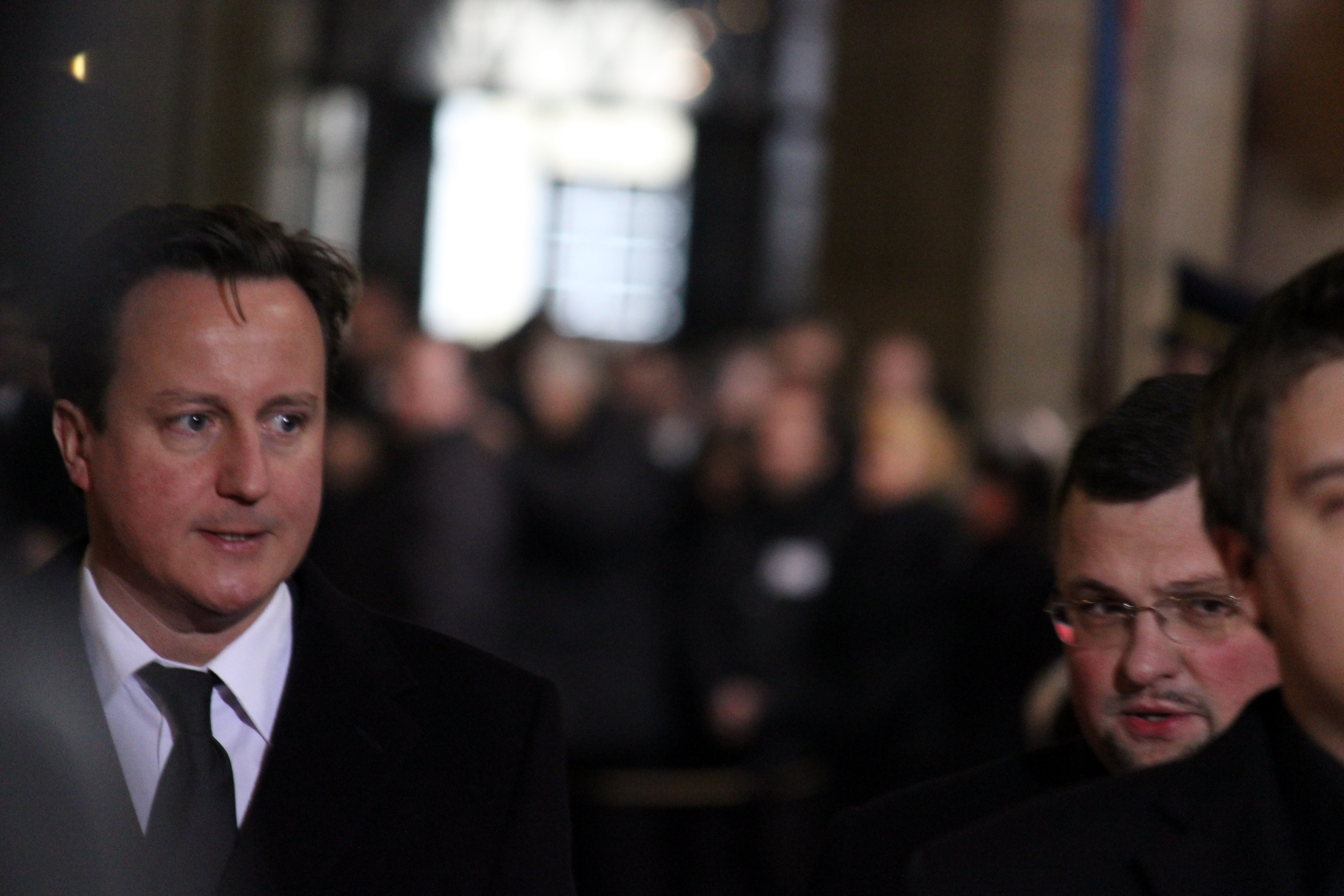 Státní pohřeb Václava Havla, posledního československého a prvního českého prezidenta, proběhl v pátek 23. prosince 2011 od 12.00 hod v katedrále svatého Víta, Václava a Vojtěcha na Pražském hradu. Zúčastnila se jej manželka Dagmar Havlová s dalšími rodinnými příslušníky, nejvyšší čeští ústavní činitelé v čele s prezidentem republiky Václavem Klausem, politici, diplomaté a řada významných hostů z České republiky i zahraničí. This photograph was taken with a DSLR from WMCZ's Camera grant.